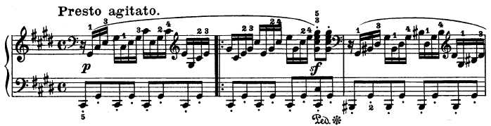 Ludwig van Beethoven: Mondschein Sonata part 3